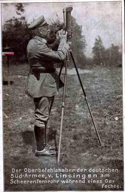 von Linsing im Gefecht